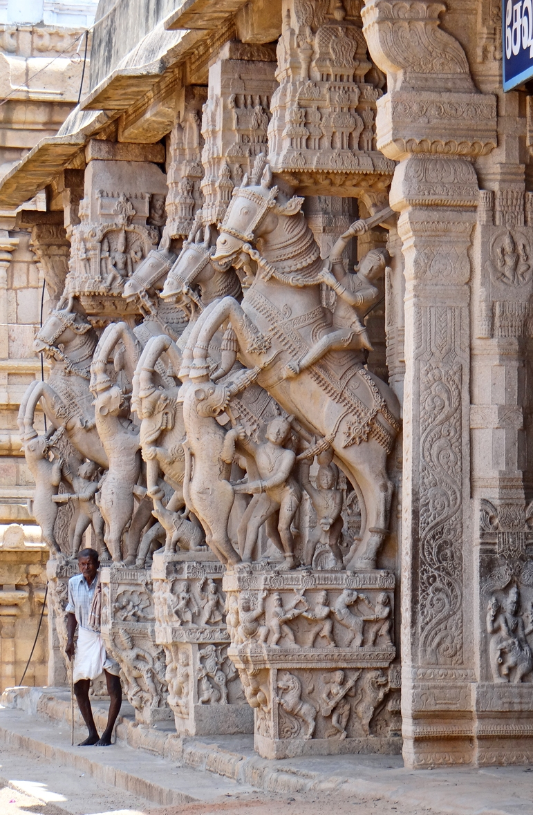 Piliers sculptés montrant des chevaux dressés avec des cavaliers et des soldats combattant des tigres dans le mandapa Sesharayar (4ème enceinte) Les sculptures du Sesharayar (ou Sheshiyar) Mandapa, situé près de la porte est, datent de l'époque de Vijayanagar (XVIème siècle) Les tigres symbolisent les musulmans avec lesquels la dynastie Vijayanagar était en guerre avant d'être totalement vaincue (voir le site d'Hampi) Le temple de Srirangam est une véritable cité religieuse, dont l'édification a commencé au Xème siècle. Le sanctuaire dédié à Vishnu (golden temple) est au centre des bâtiments, c'est la partie la plus ancienne. Srirangam est le premier des cent huit sanctuaires du dieu Vishnu (appelé ici : Ranganatha, qui est la forme de repos de Vishnou). C'est le plus vaste temple avec 156 hectares et le plus célèbre. Le temple est constitué de sept enceintes dominées par 21 gopuram(s) (portes d'entrée monumentales). Il comprend de nombreuses boutiques, bassins, mandapa(s) et petits temples. La partie centrale (au-delà de la 6ème enceinte) et le sanctuaire sont réservés aux hindous. Article de Wikipedia sur le temple de Srirangam Le site officiel du temple